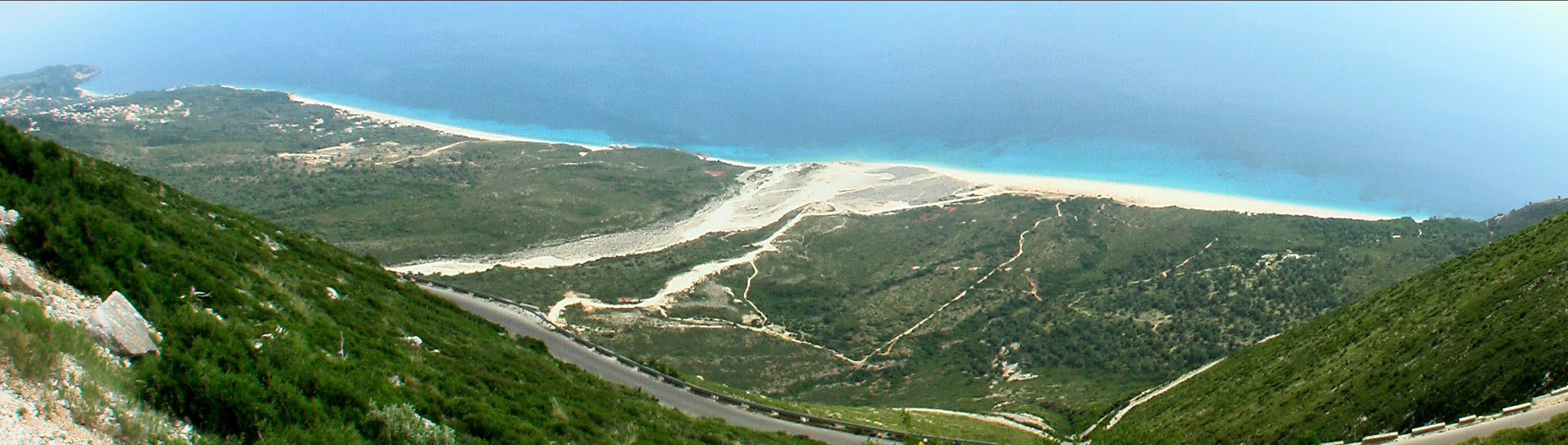 PalasëKüstePanorama